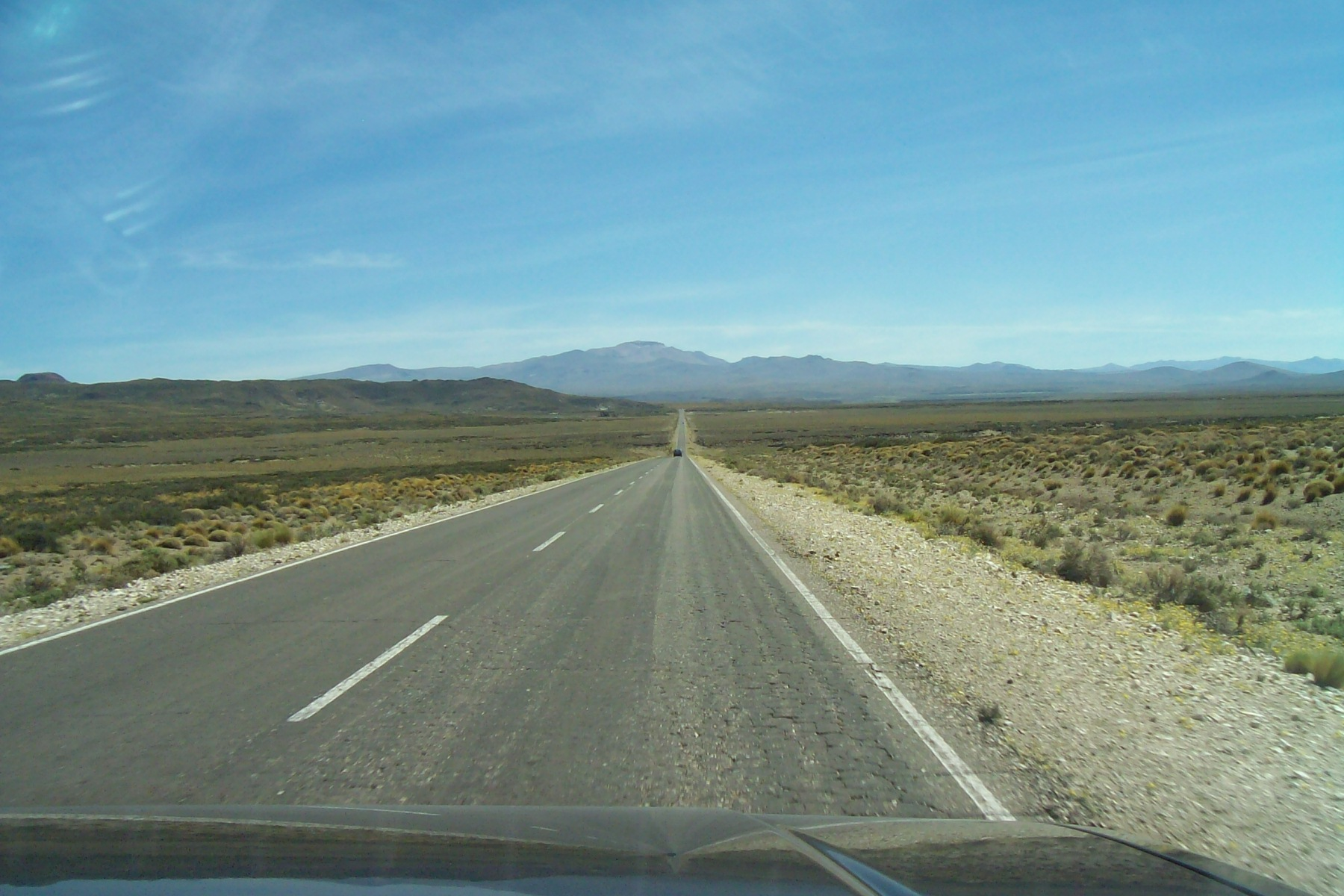 Ruta 13 provincial que lleva al lago Alumine y Moquehue, paraíso de la Trucha arco iris.